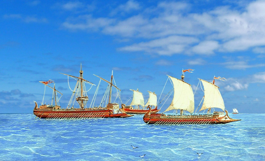 Quatre Dromons